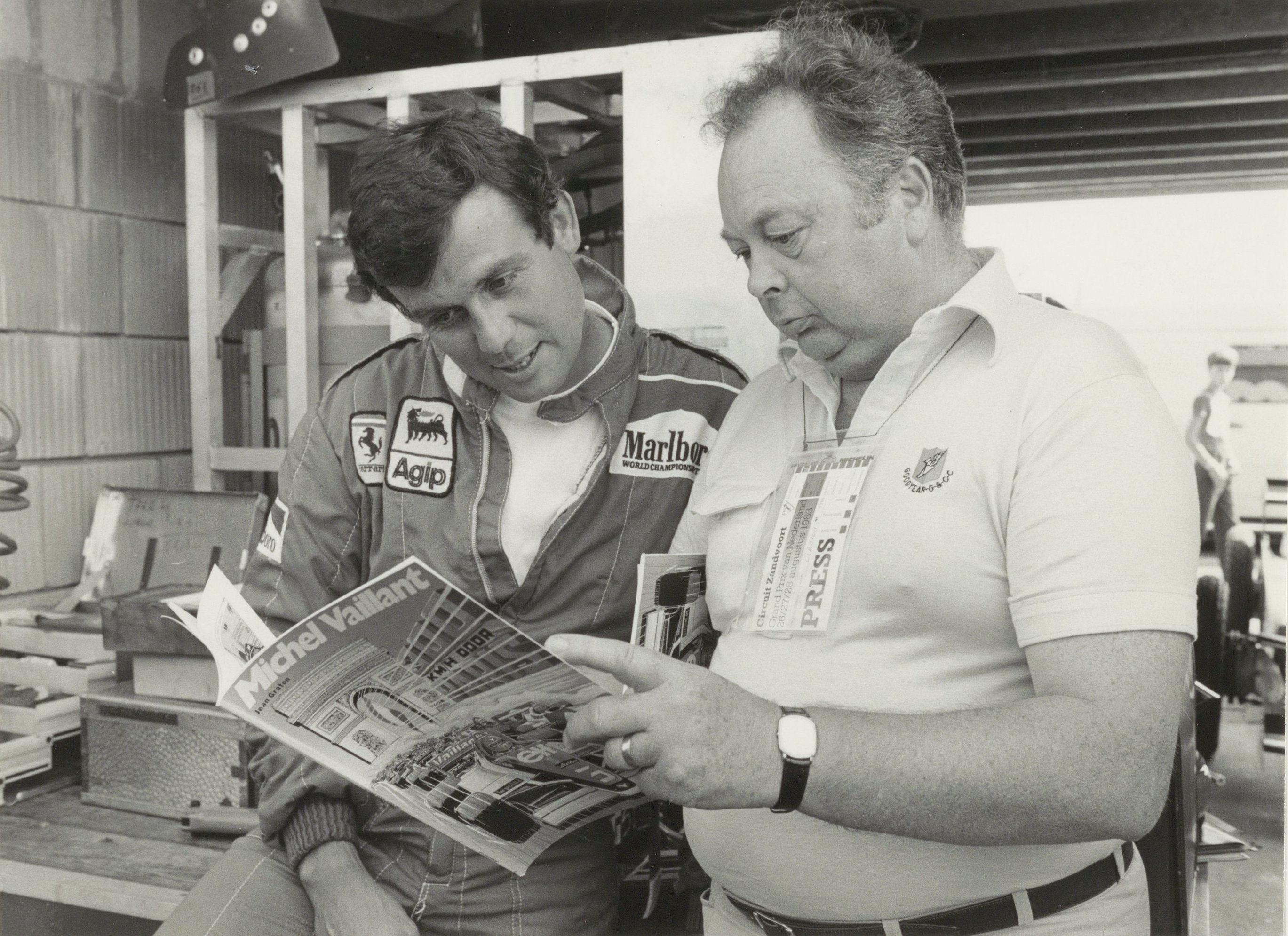 CollectieCollectie Fotoburo de BoerInventarisnummerNL-HlmNHA_54005237BeschrijvingZandvoort circuit: De striptekenaar Graton in de pitsFotonummerNL-HlmNHA_1478_6738DocumenttypeTopografische prenten, tekeningen en foto'sVervaardigerBoer, Cees de (1918-1985) Soort vervaardigerFotograaf AnnotatiesZv 1LandNederland ProvincieNoord-Holland GemeenteZandvoort PlaatsZandvoort StraatBurgemeester van Alphenstraat GeografischCircuit Park Zandvoort Begindatum1983Einddatum1983TechniekFoto Trefwoordensport en recreatie, autosport, autoraces